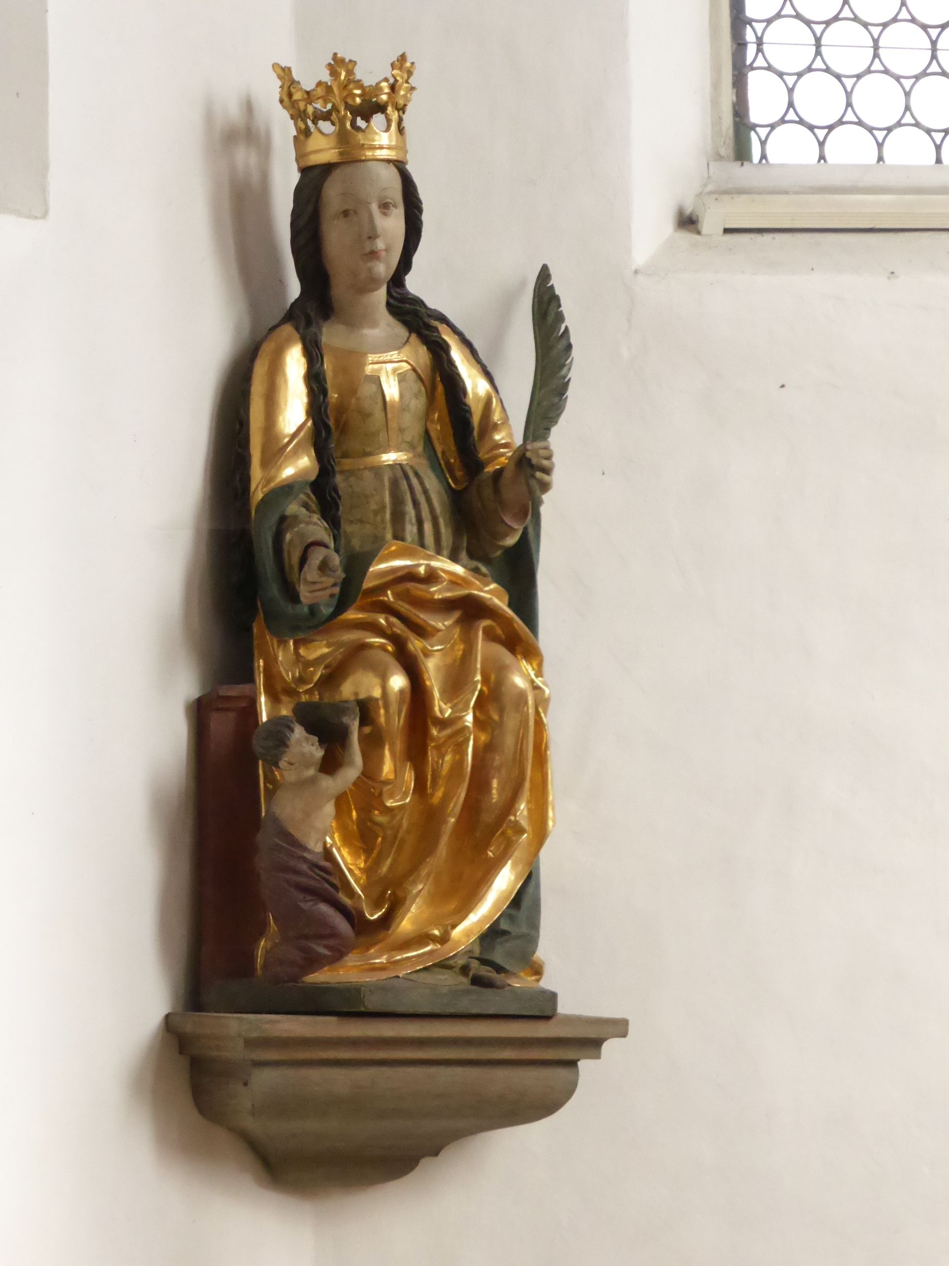 Massing (Wallfahrtskirche St. Corona Staudach)